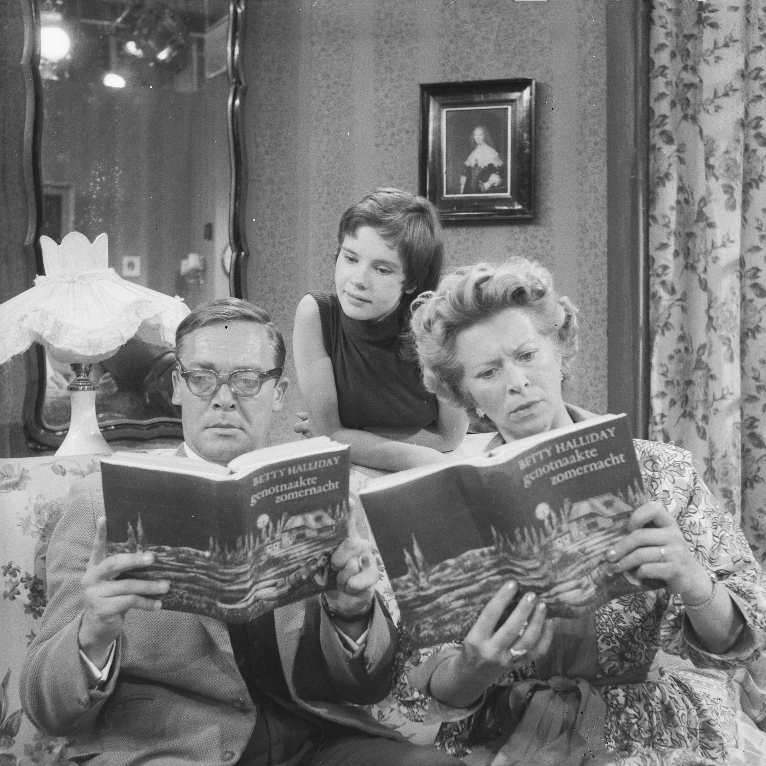 Collectie / Archief : Fotocollectie Anefo Reportage / Serie : [ onbekend ] Beschrijving : Blijspel 'Het boek van de maand' van de AVRO scene met v.l.n.r. Pim Dikkers, Marianne Rector en Fien Berghegge Annotatie : Dit blijspel van Basil Thomas werd in 1955 al opgevoerd door toneelgroep Theater. Ouders lezen het door hun 17-jarige dochter geschreven boek met gewaagde sexuele passages Datum : 17 juni 1959 Trefwoorden : acteurs, televisiedrama's Persoonsnaam : Berghegge, Fien, Dikkers, Pim, Rector, Marianne Fotograaf : Noske, J.D. / Anefo Auteursrechthebbende : Nationaal Archief Materiaalsoort : Negatief (zwart/wit) Nummer archiefinventaris : bekijk toegang 2.24.01.03 Bestanddeelnummer : 910-4496